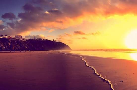 أحد شواطئ ميراللفت